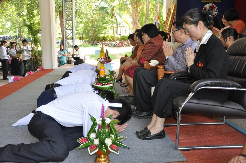 Día del profesores